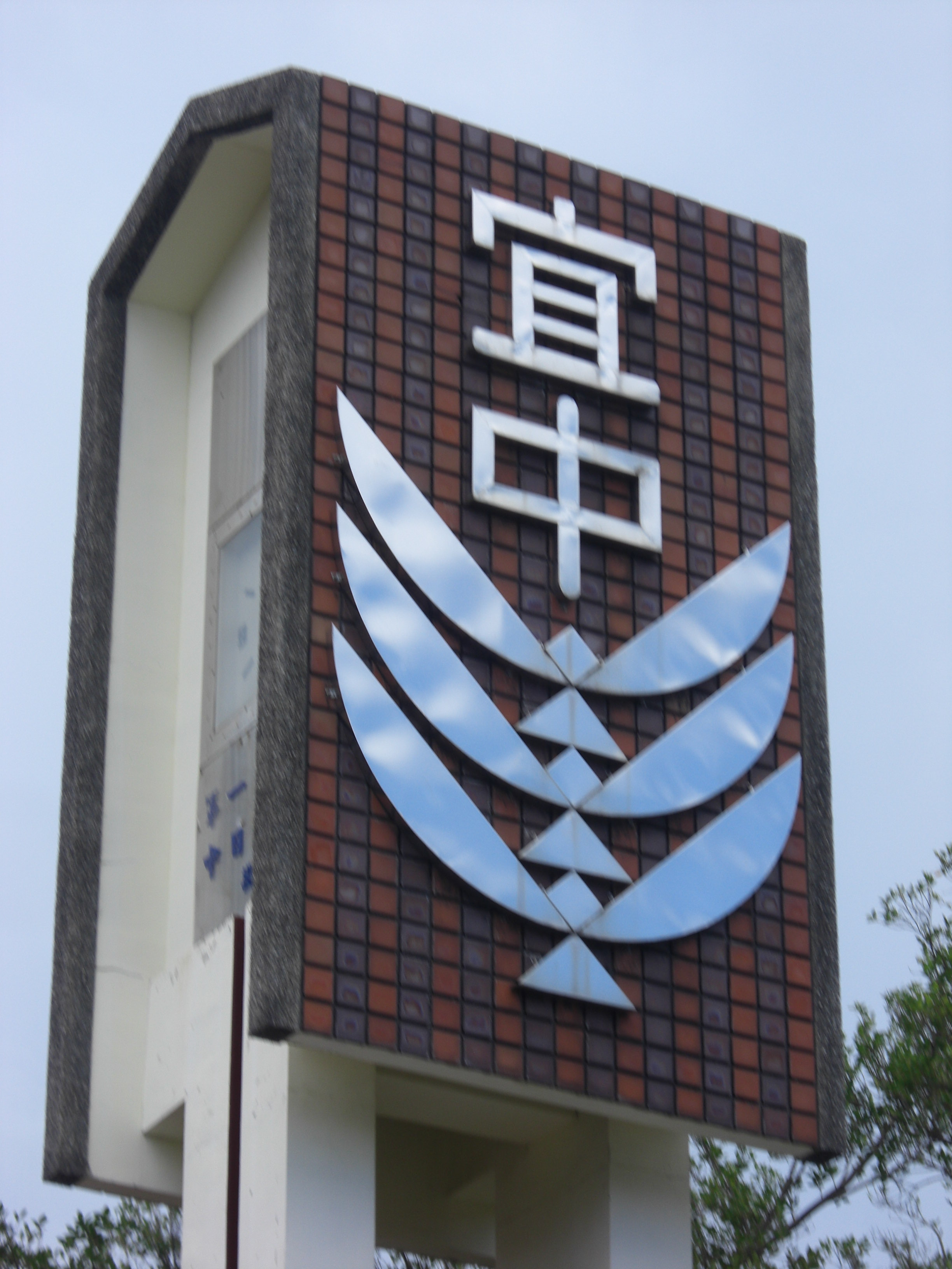 中文（台灣）: 宜蘭高中校門口的牌坊。